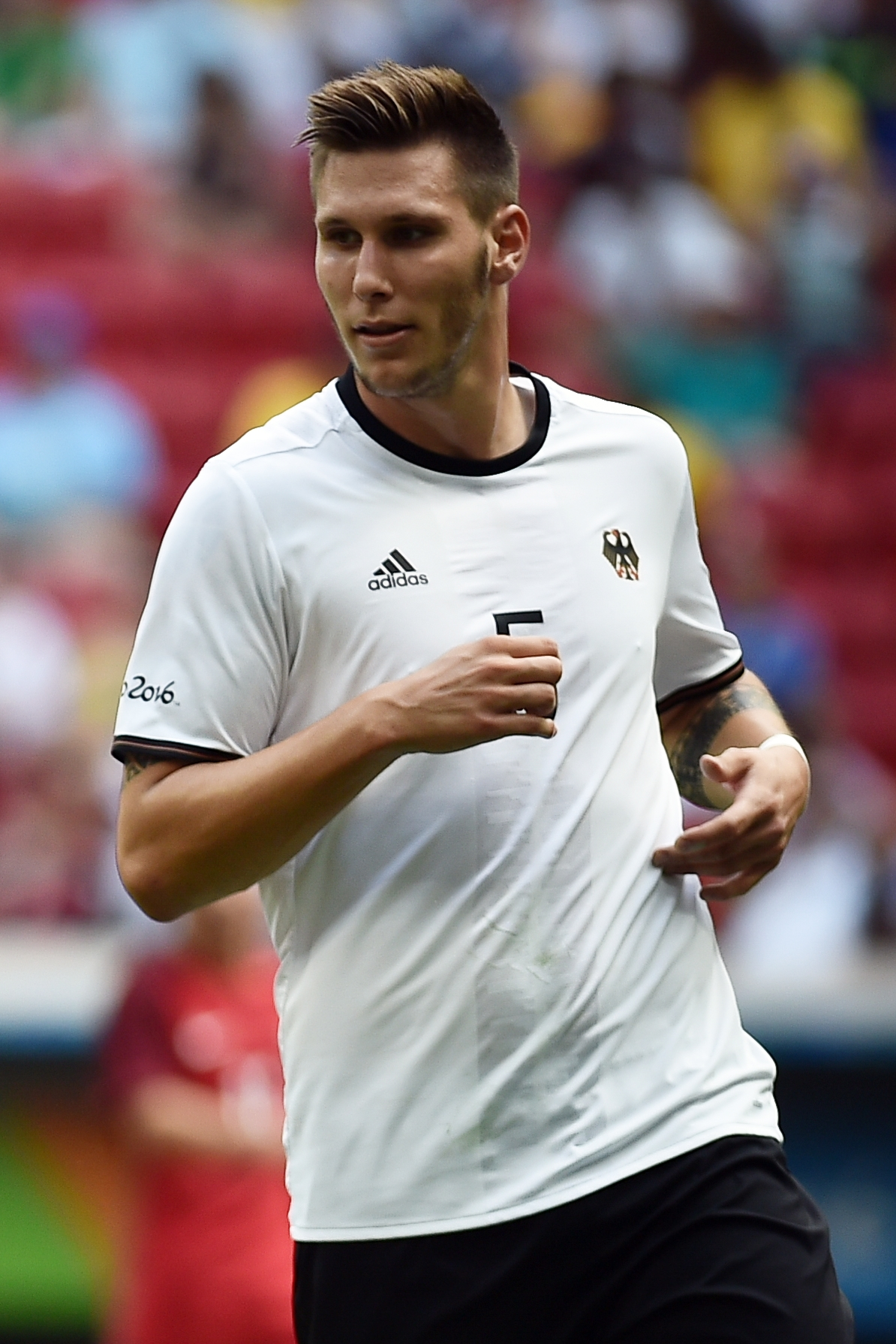 Estádio Nacional de Brasília Mané Garrincha, Brasília, DF, Brasil, 13/8/2016 Foto: Andre Borges/Agência Brasília Portigal e Alemanha jogam neste sábado (12), no Estádio Mané Garrincha, pelas quartas de final do futebol masculino nas Olimpíadas 2016.